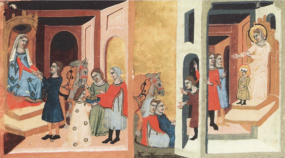 Drahomíra dává Tunnovi a Gomonovi koně a stříbro, aby zabili sv. Ludmilu. Tunna a Gomon před sv. Ludmilou a sv. Václavem. Sv. Ludmila se zpovídá a připravuje na smrt. Tunna a Gomon vyrážejí dveře komnaty a rdousí sv. Ludmilu.